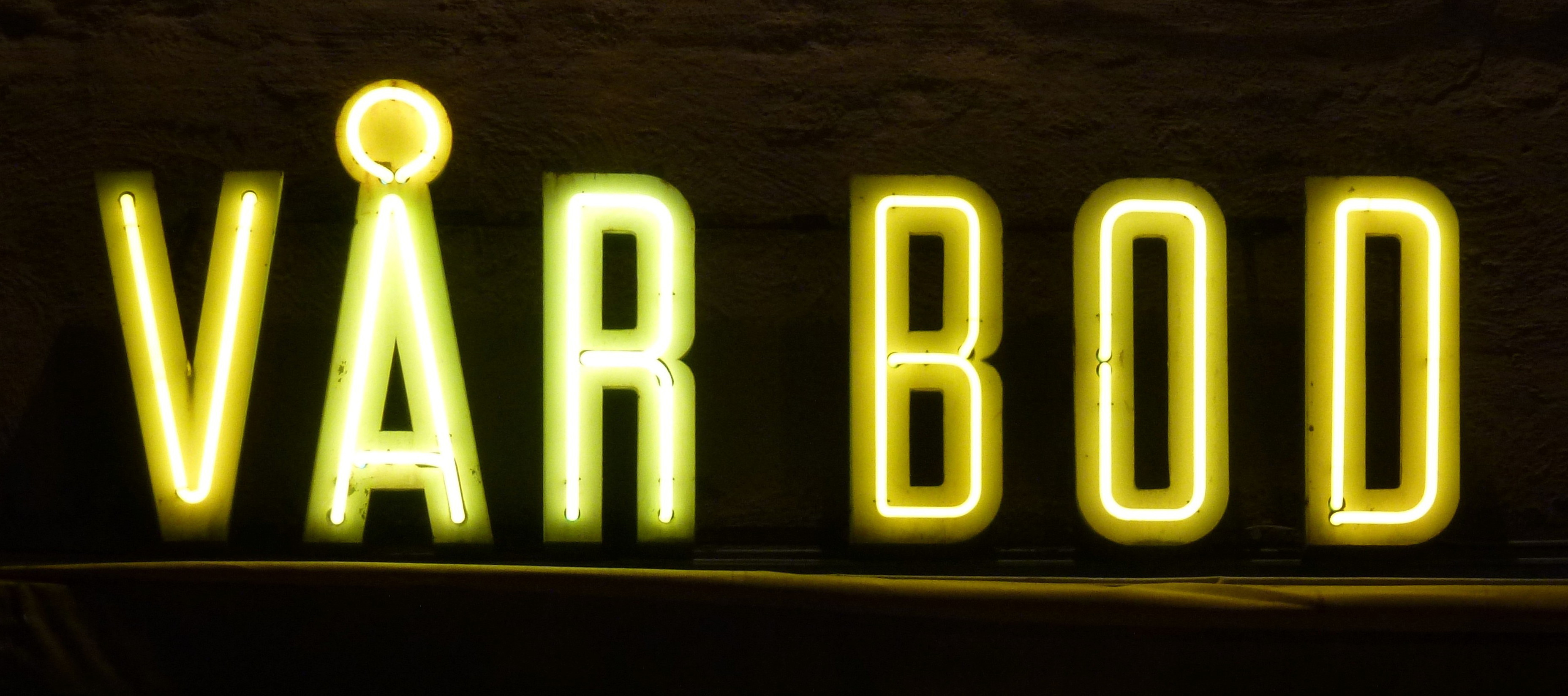 Neonskylt "Vår Bod", Ringvägen 129